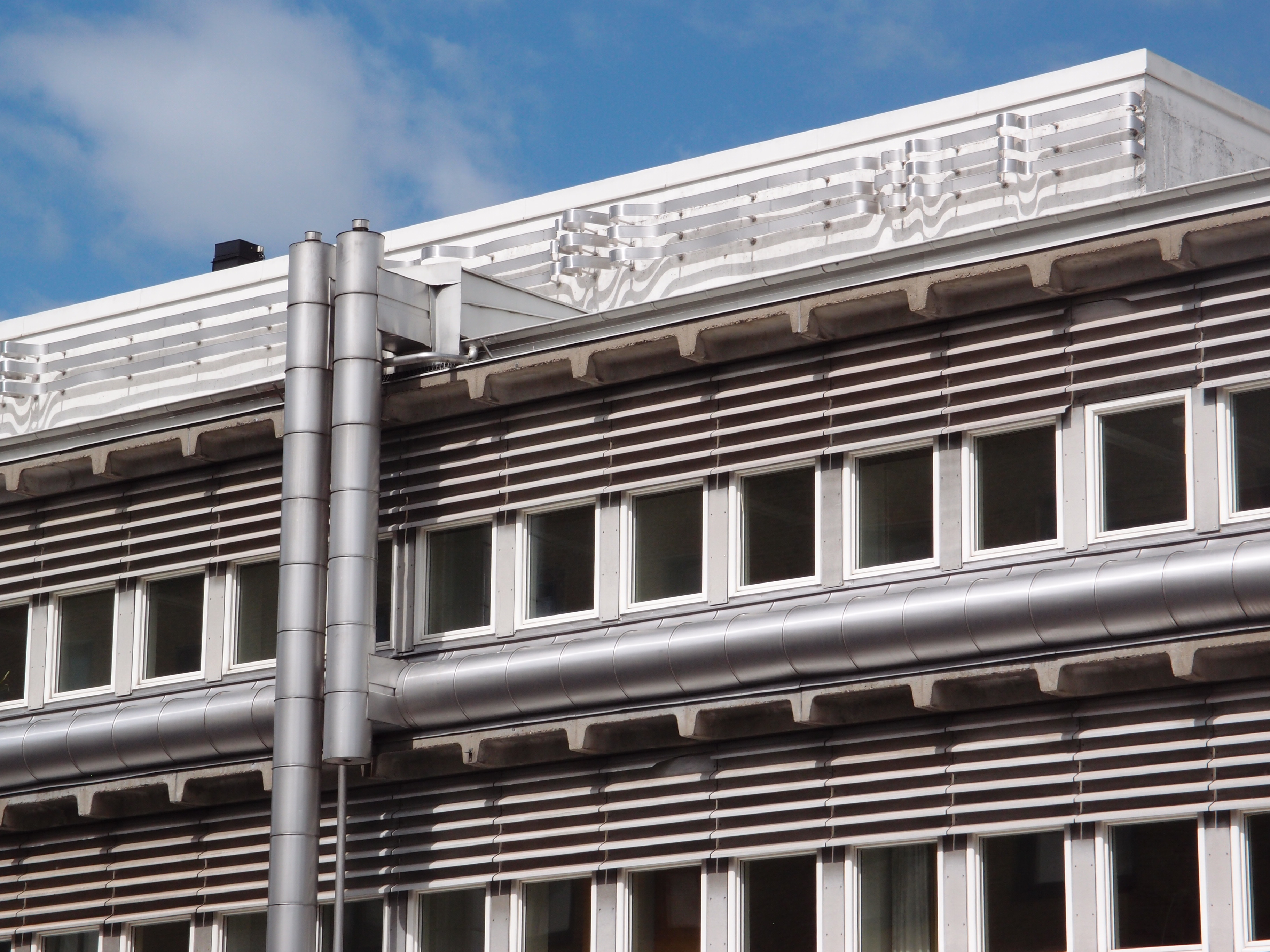 Landsstatshuset i Malmö, byggt 1974. Arkitekt Bernt Nyberg. Överst: del av "Skulptur för ljus och skugga" av Barbro Bäckström (1976).